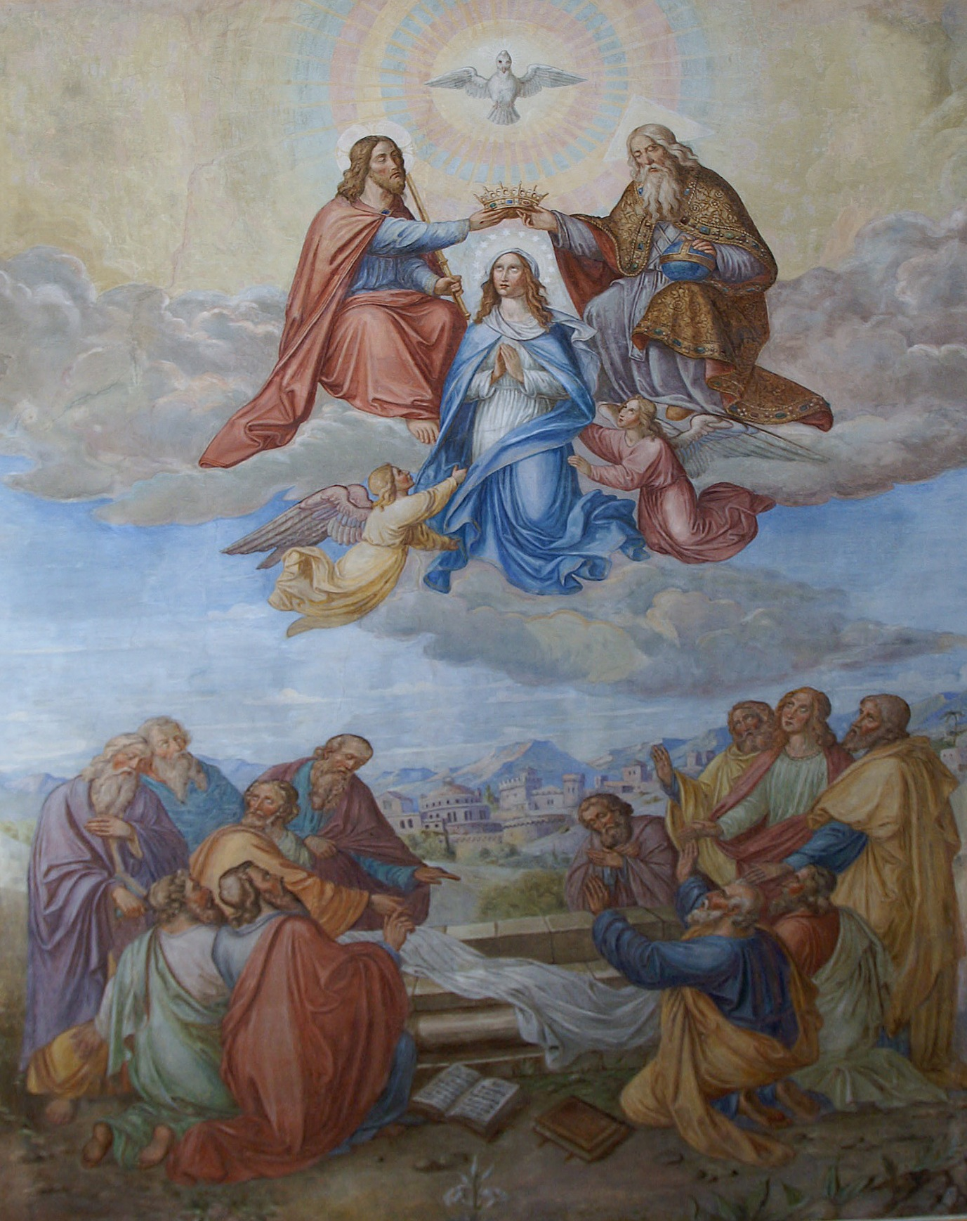 Deckenbild in der Pfarrkirche hl. Leonhard in Riefensberg, Vorarlberg.